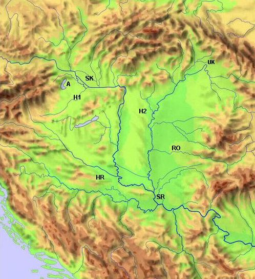 Pannonische Tiefebene: im Westen die Kleine Ungarische Tiefebene (Ländersymbole H1, A, SK), im Osten die Große Ungarische Tiefebene (H2) mit Batschka und Banat (HR, SR, RO) {Bild-GFDL} Edited from an copyrighted file: Image:Pannonian_plain01.jpg